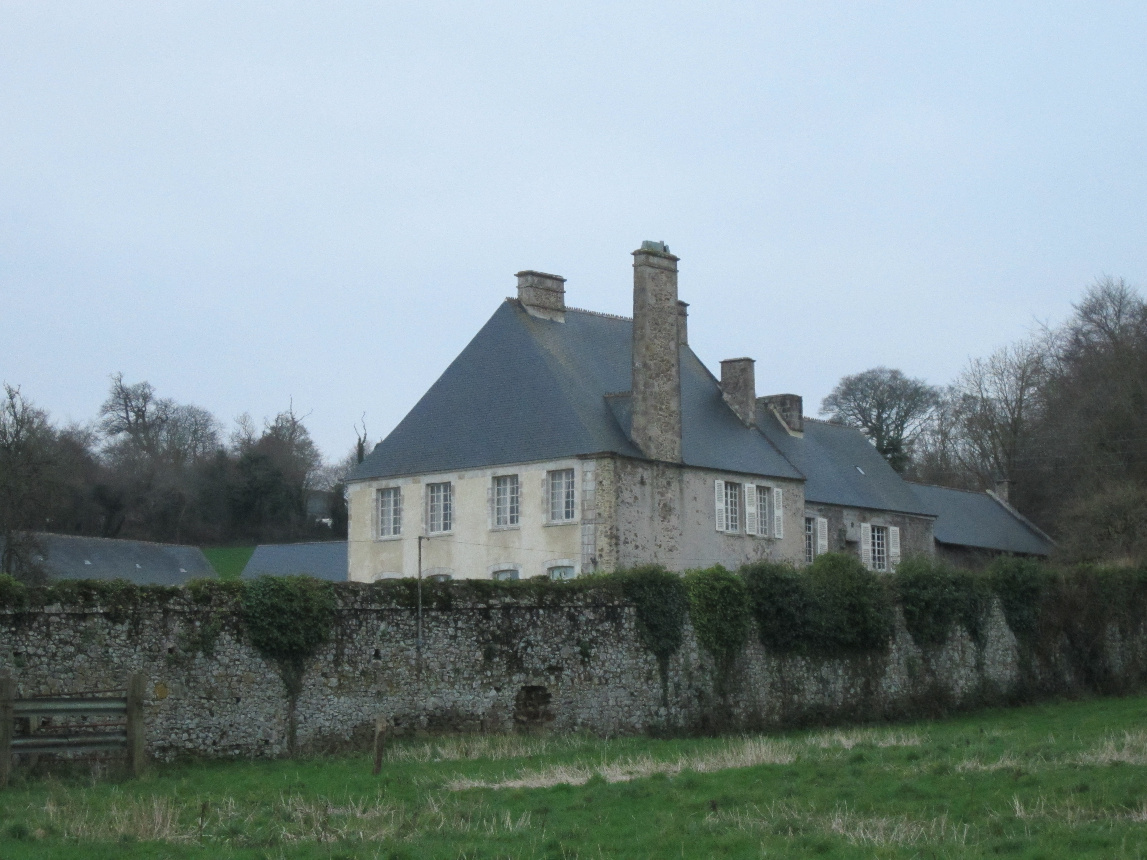 Pavillon de Grenneville édifice a été construit à la fin du 15e siècle ou au début du 16e siècle